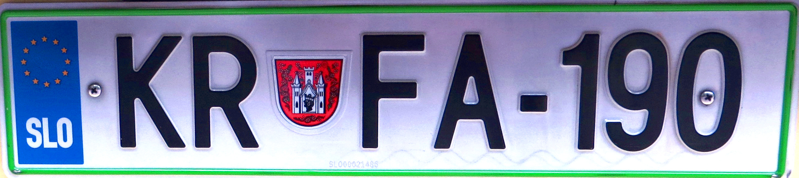 Kentekenplaat uit Slovenië